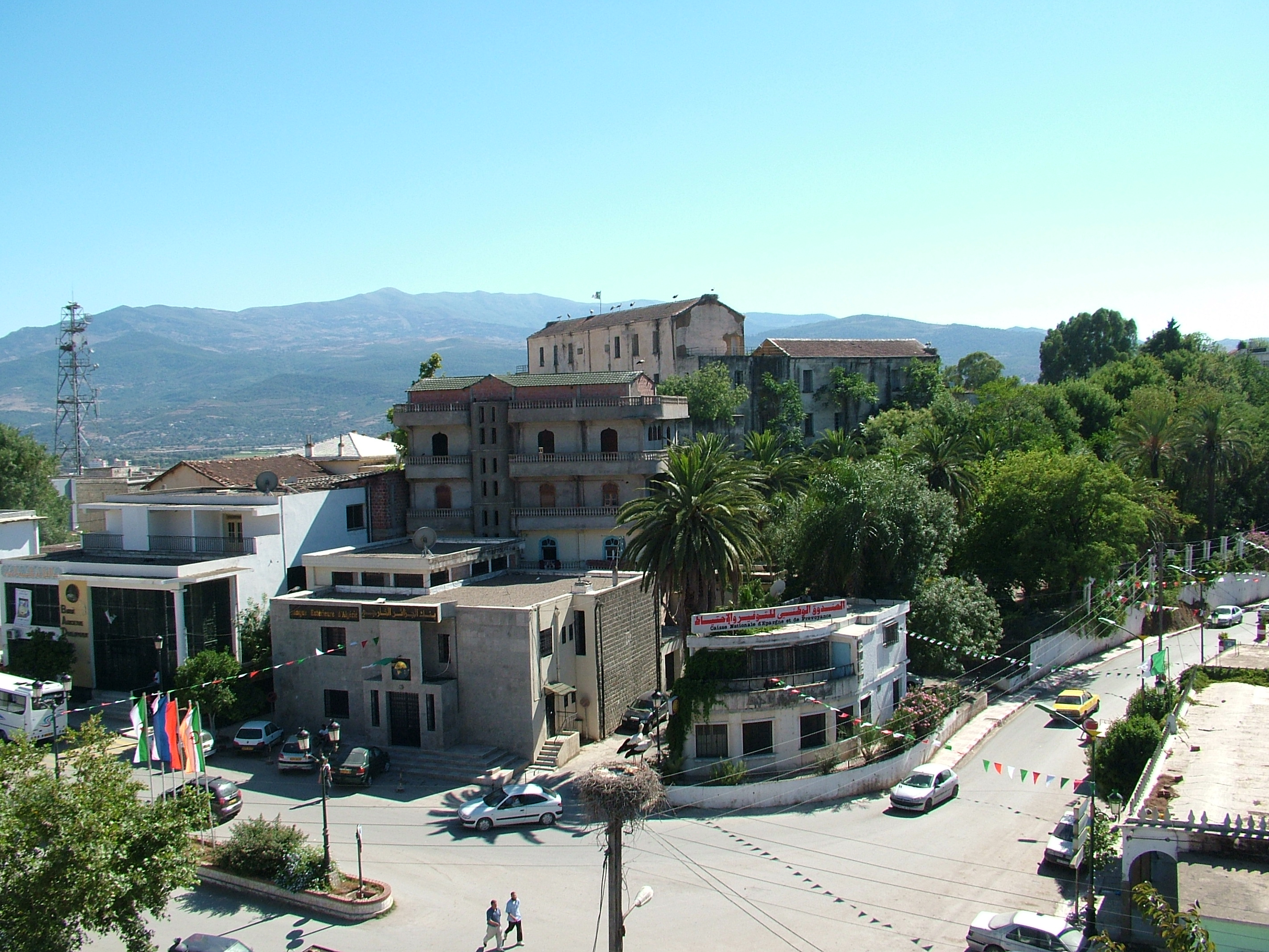 Vue sur la place des martyrs d'El Milia (wilaya de Jijel, Algeria).